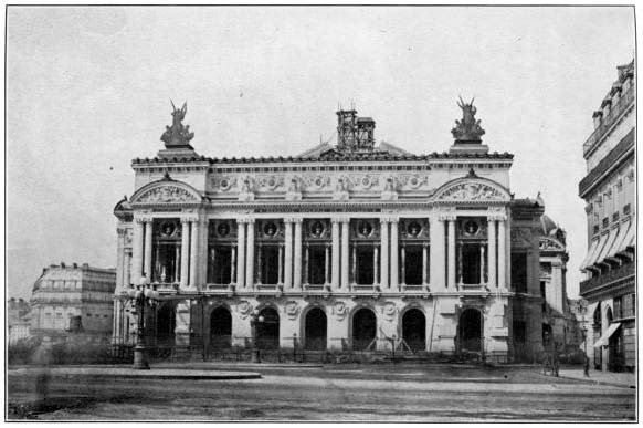 Ilustraciones libro de Memorias Saint-Saëns, 1919